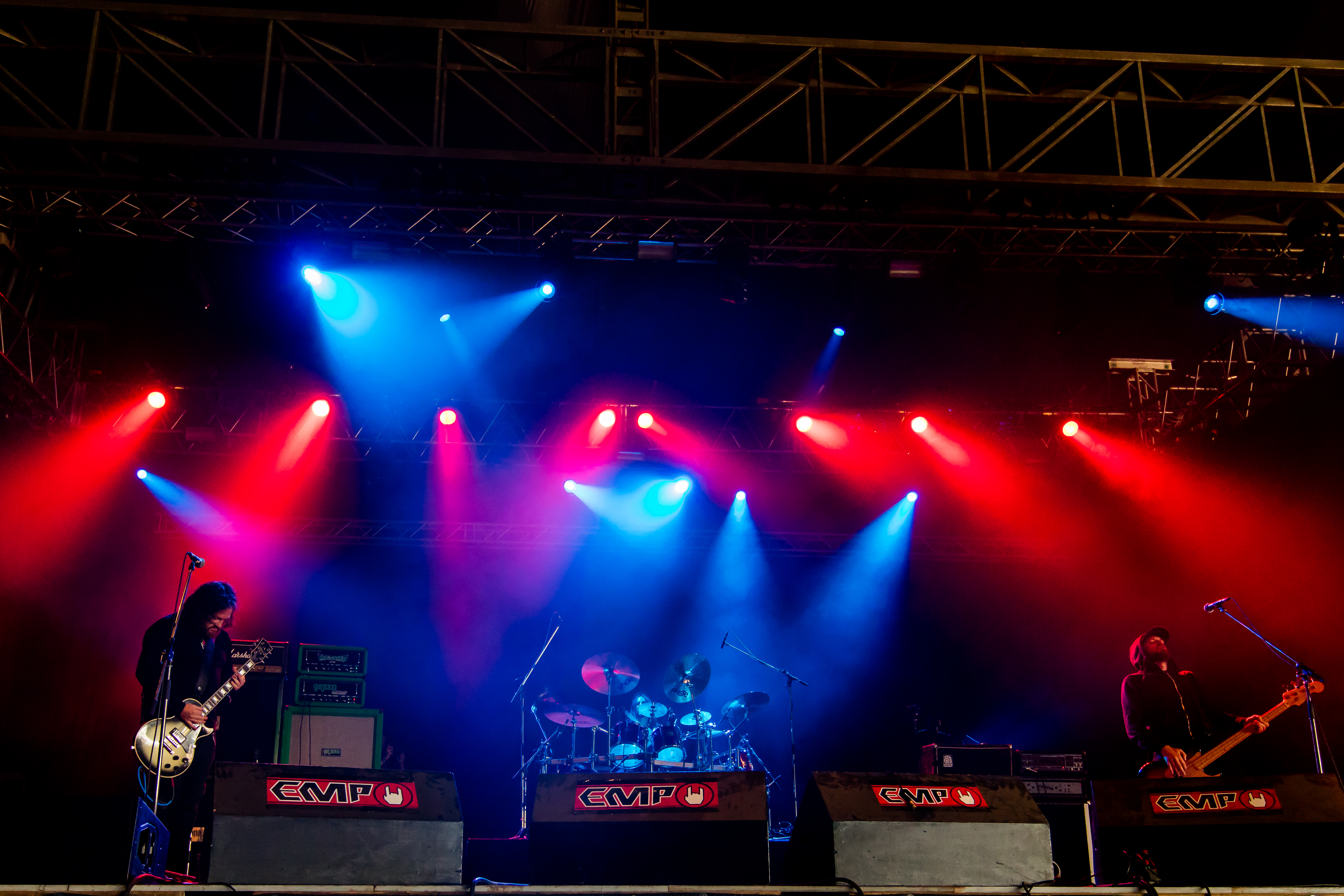 Conan during Summer Breeze 2016 at , Dinkelsbühl, Bayern, Germany on 2016-08-19, Photo: Sven Mandel